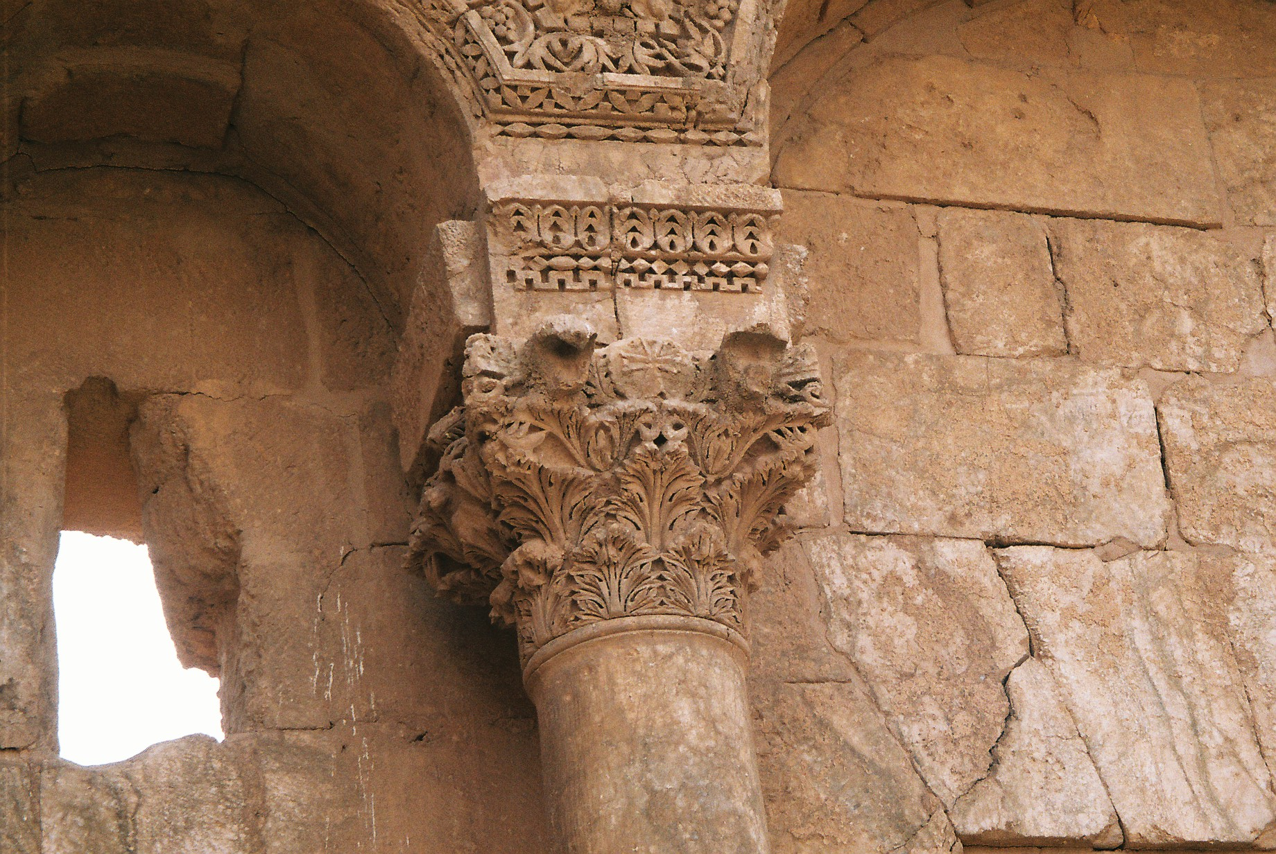 زخرفة العمود في الرصافة - سوريا